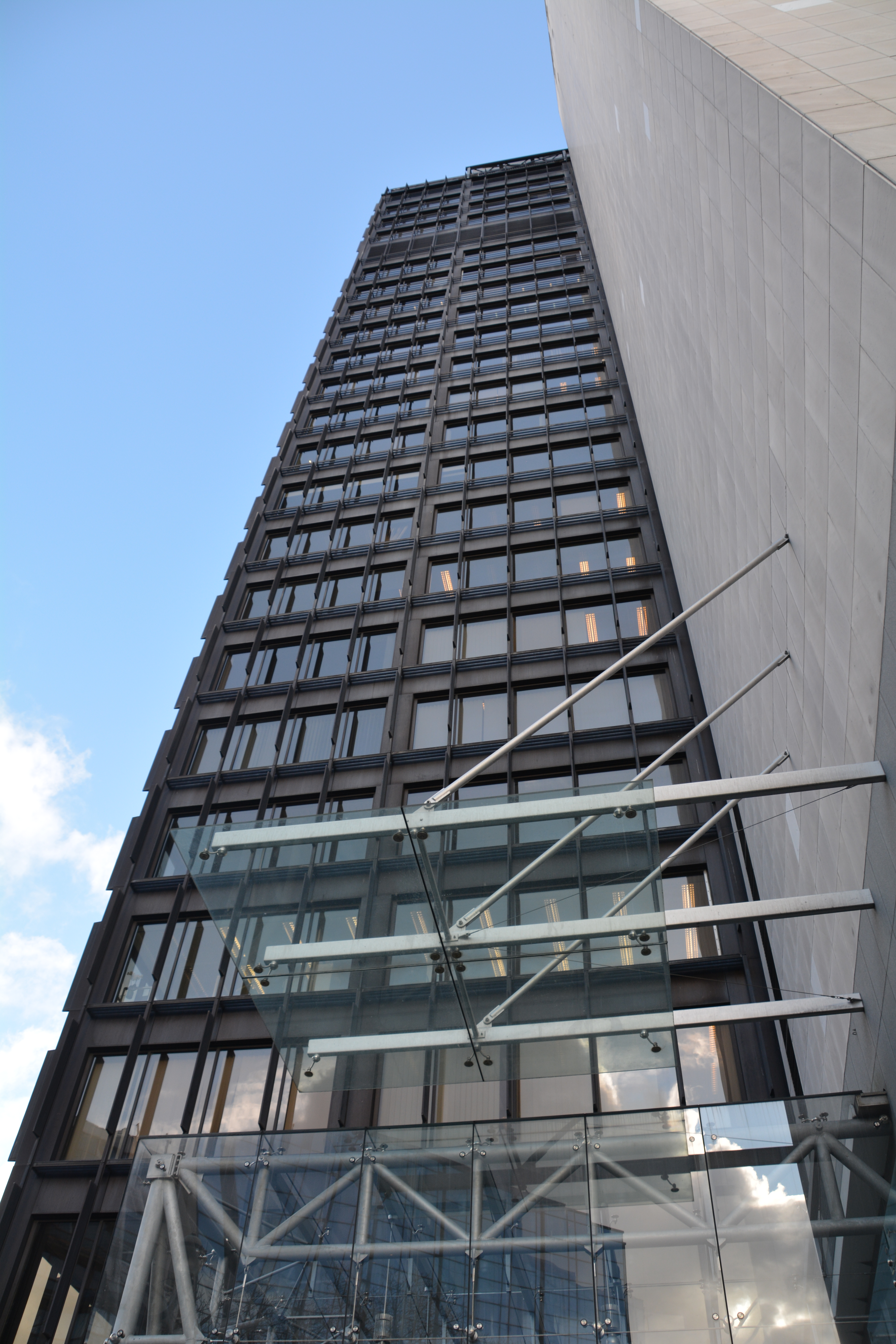 Photo montrant les deux types de tours accolées